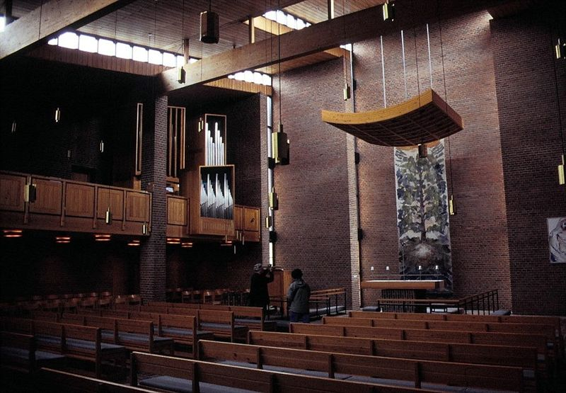 Holstebro Ellebæk Kirke i Danmark. Kirkerummet set mod nordøst